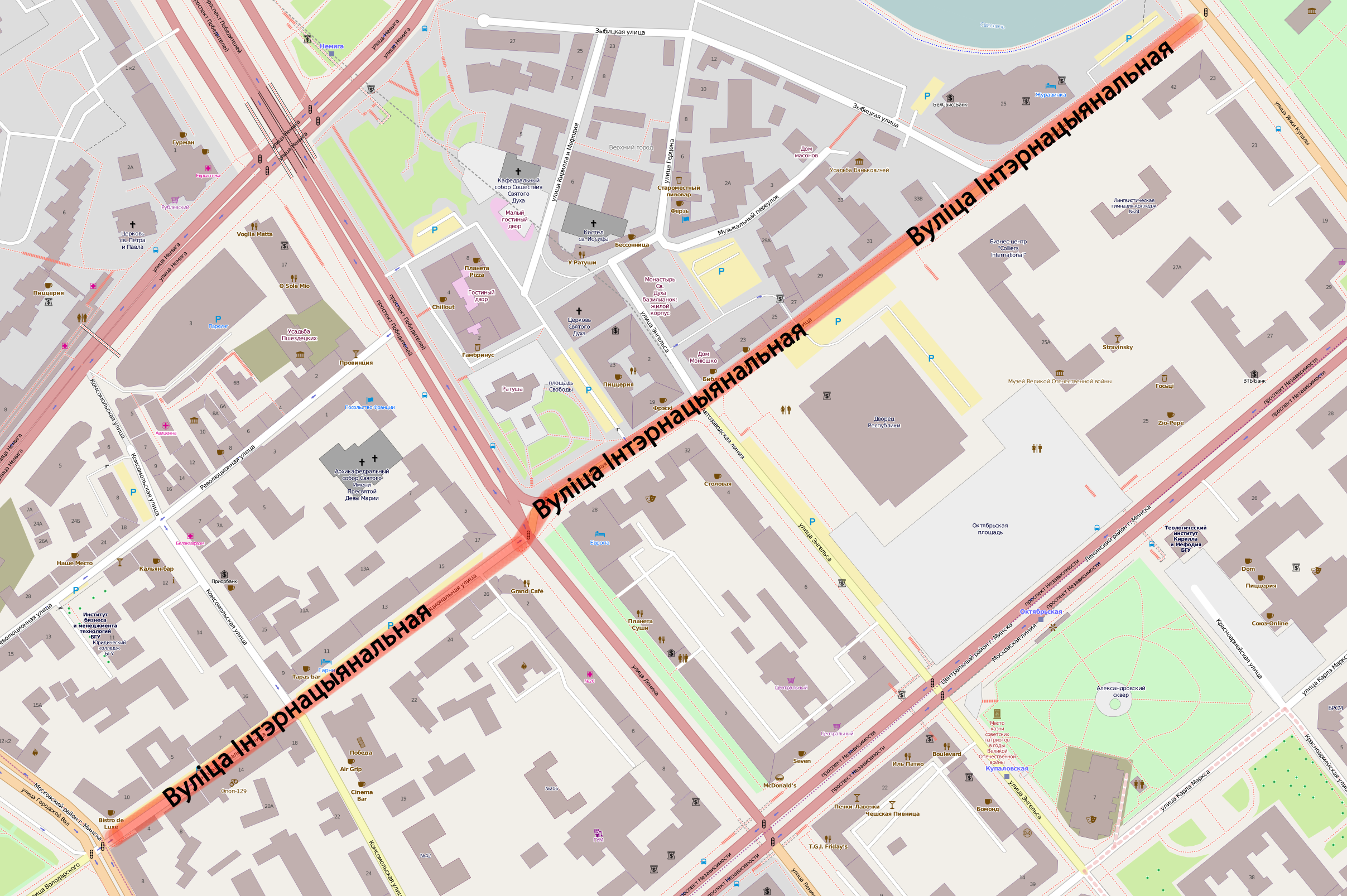 Беларуская (тарашкевіца): Вуліца Інтэрнацыянальная, Менск